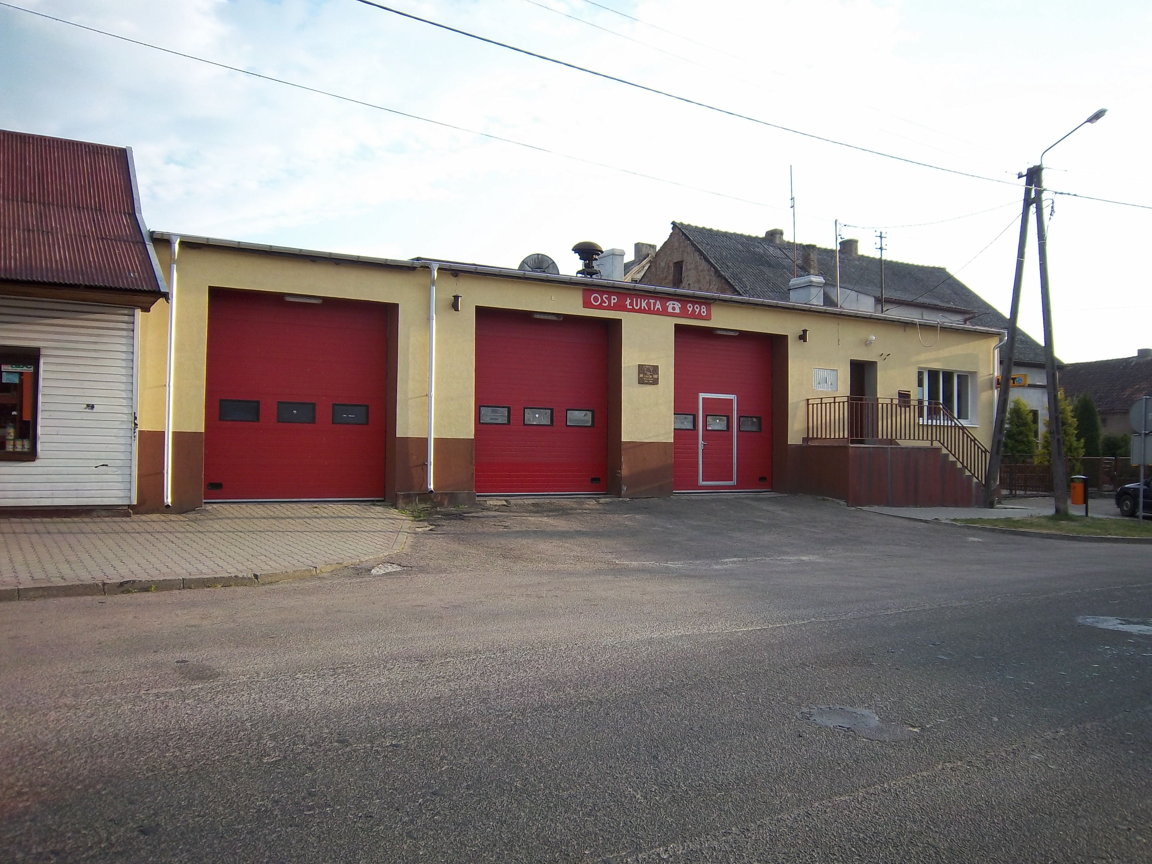 OSP w Łukcie